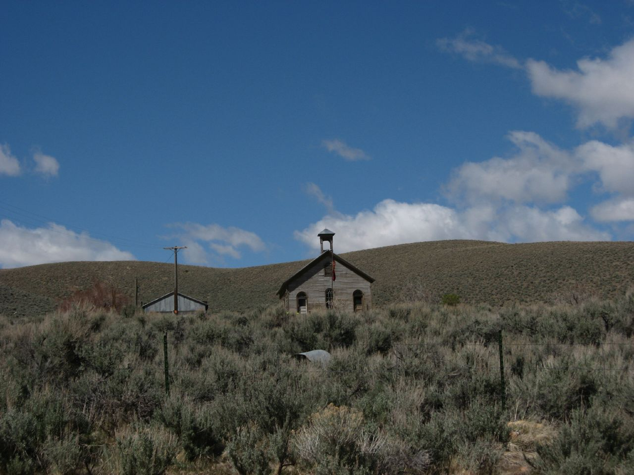 Unionville, Nevada